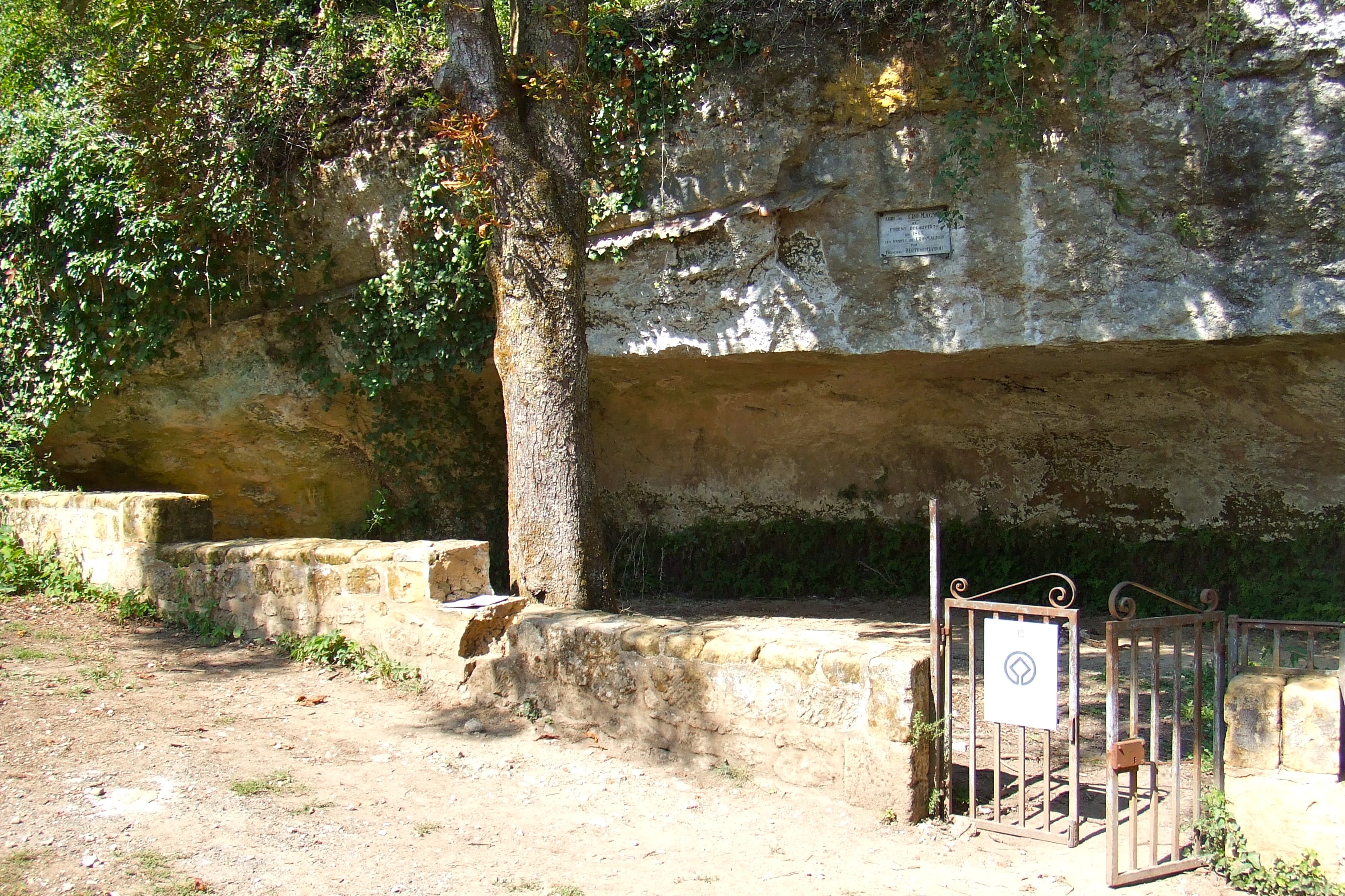 abri cro magnon .